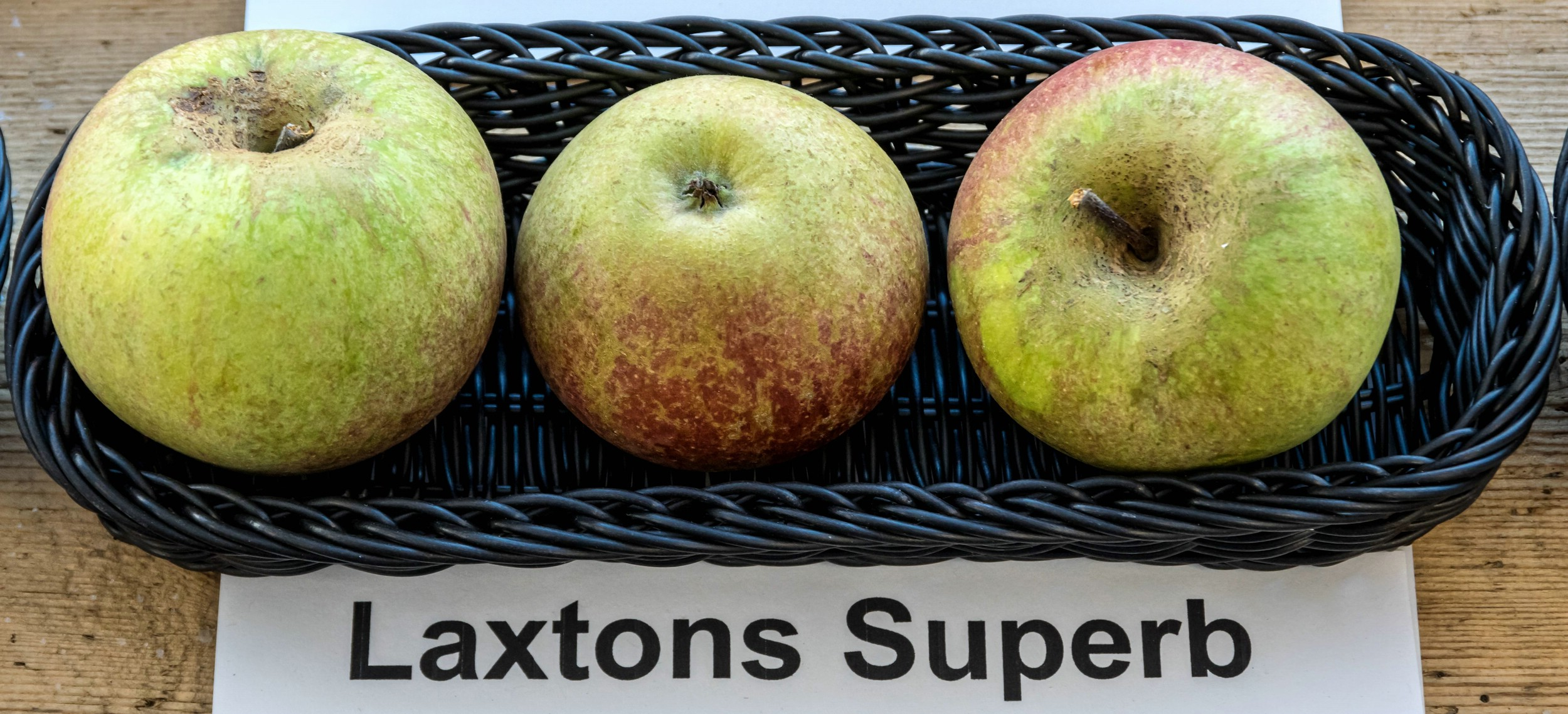 Alte Apfelsorten, von denen es im Badischen noch tragende Bäume gibt. Alle Aufnahmen au dem Oktober 2015